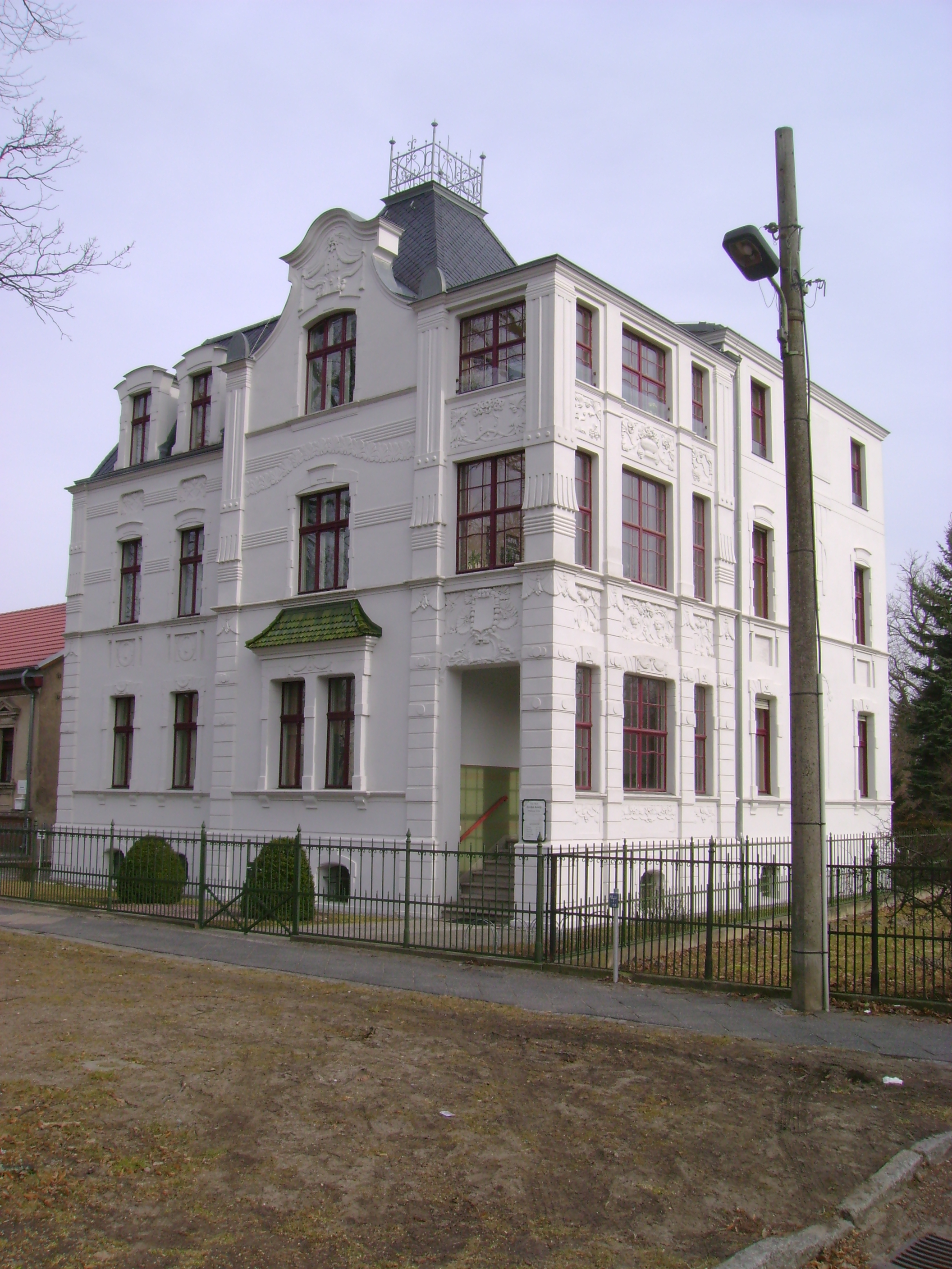 Denkmalgeschütztes Wohnhaus in Velten Breite Straße 73